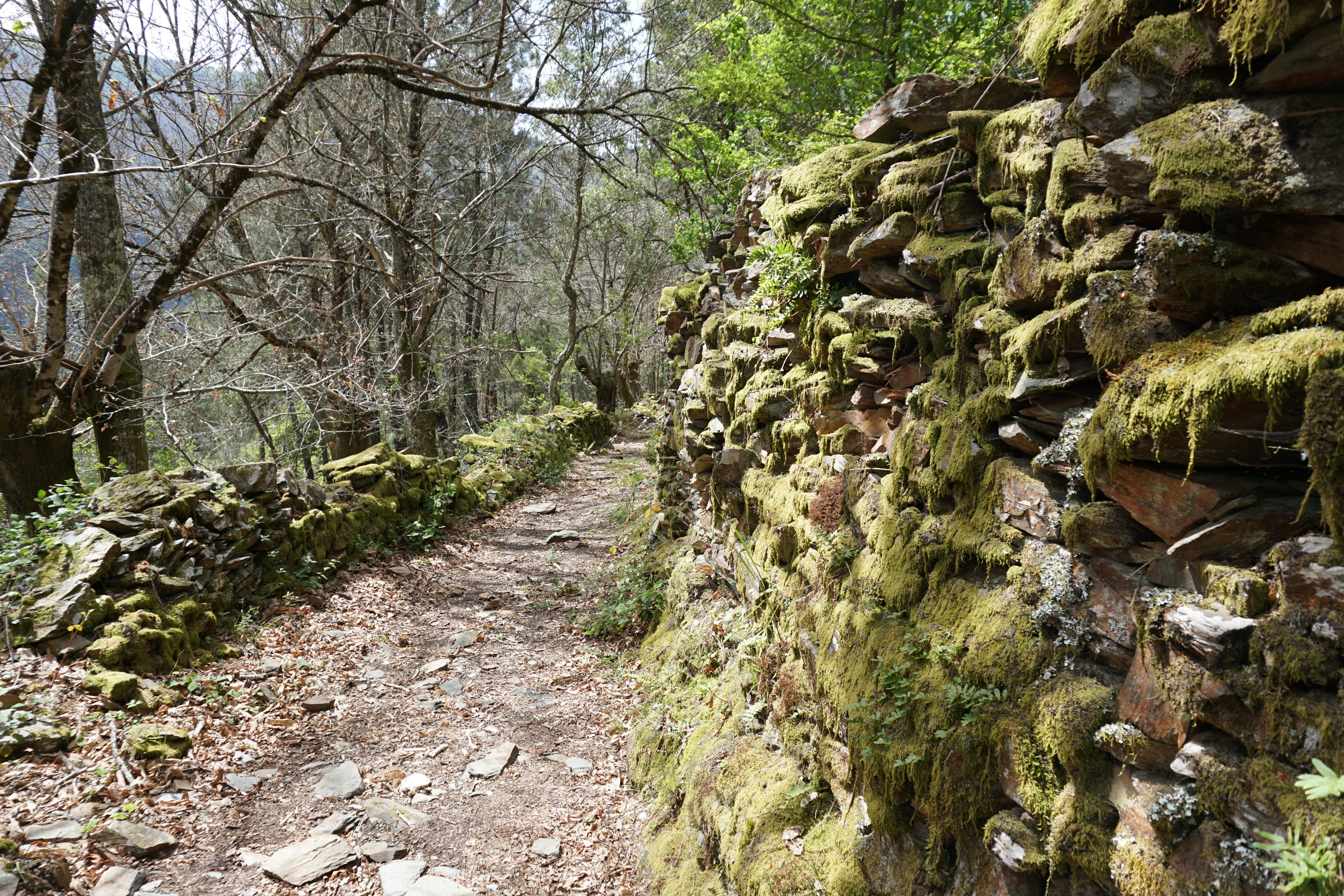 Ancares - Courel This is a photography of a Special Area of Conservation in Spain with the ID: ES1120001. Natura2000 entry, EEA entry